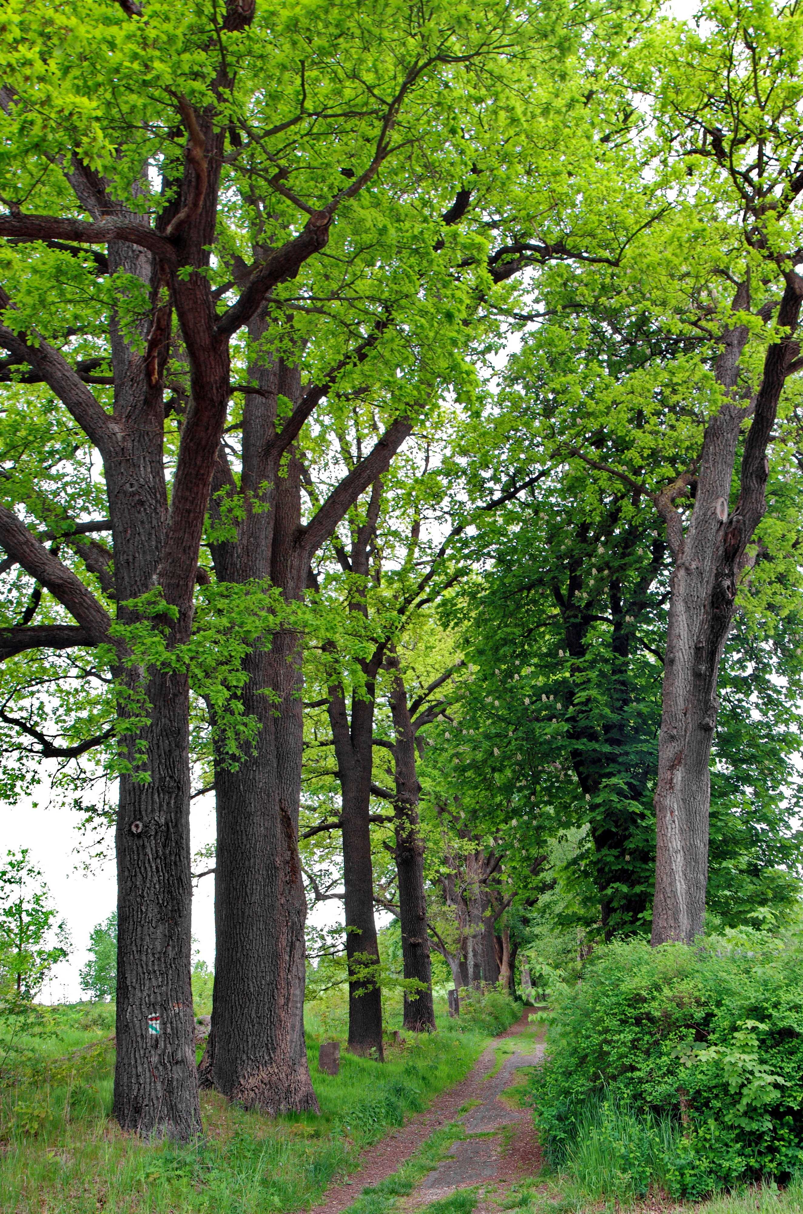 Památné stromy Zámecká alej a skupina buků v Horních Lubech, okres Cheb